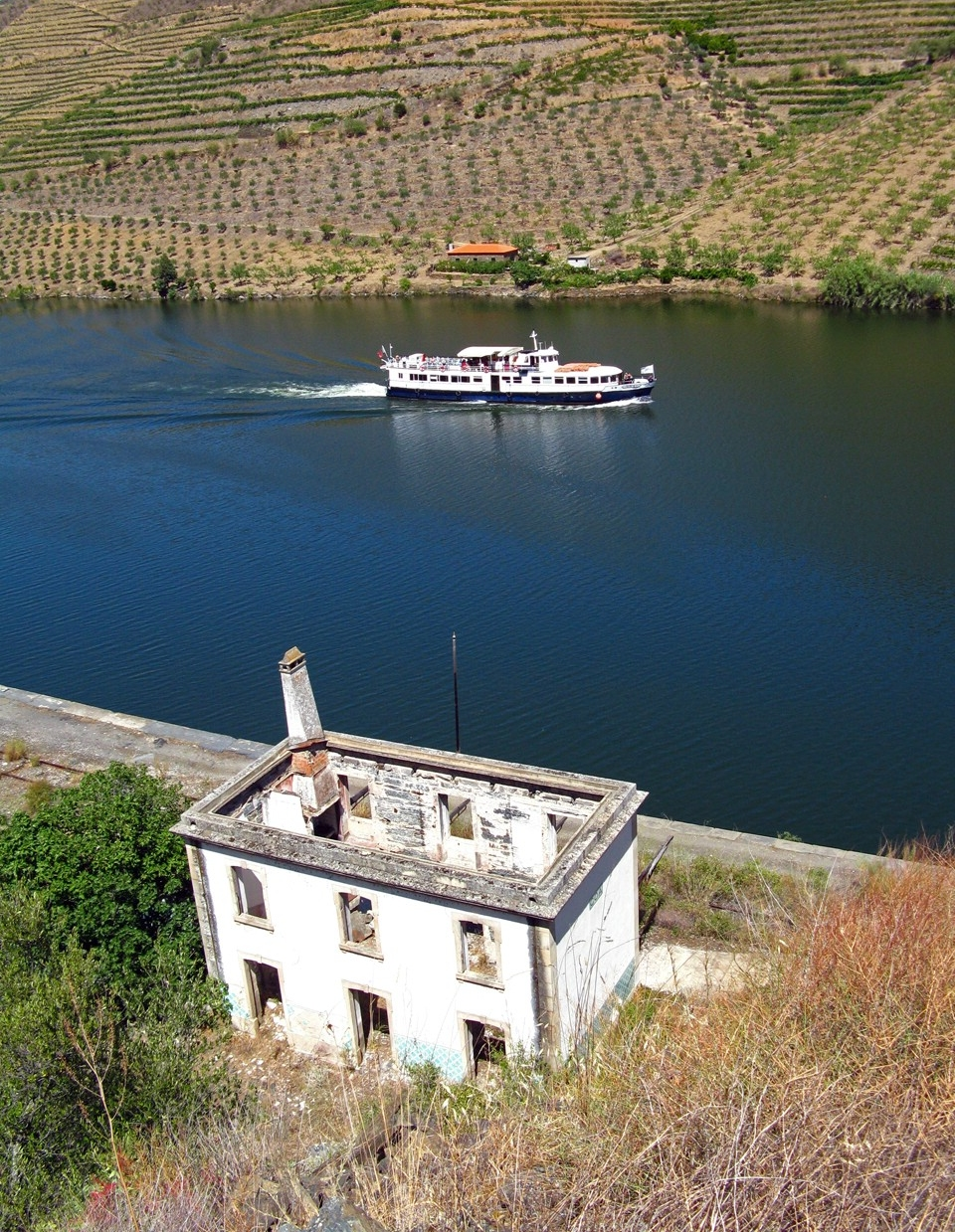 Sem comentários